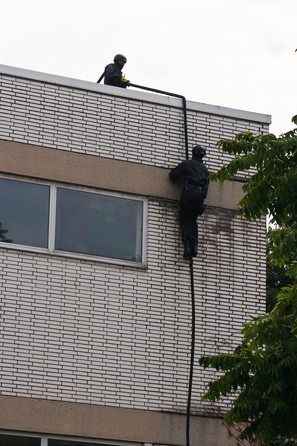 SEK der Polizei, NRW-Tag Hamm 2009, Datum/Uhrzeit: 28.06.2009 15:04:09